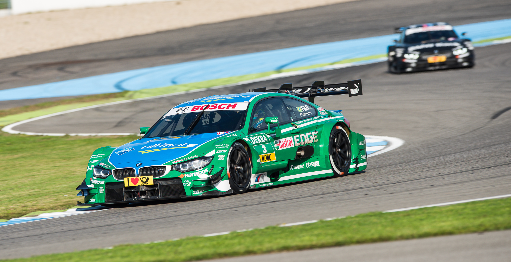 Augusto Farfus,BMW Bank M4 DTM,Bruno Spengler,Castrol EDGE BMW M4 DTM,DTM,Deutsche Tourenwagen Masters,Hockenheimring,Motorsport,RBM,Racing Bart Mampaey,Schnitzer Motorsport GmbH